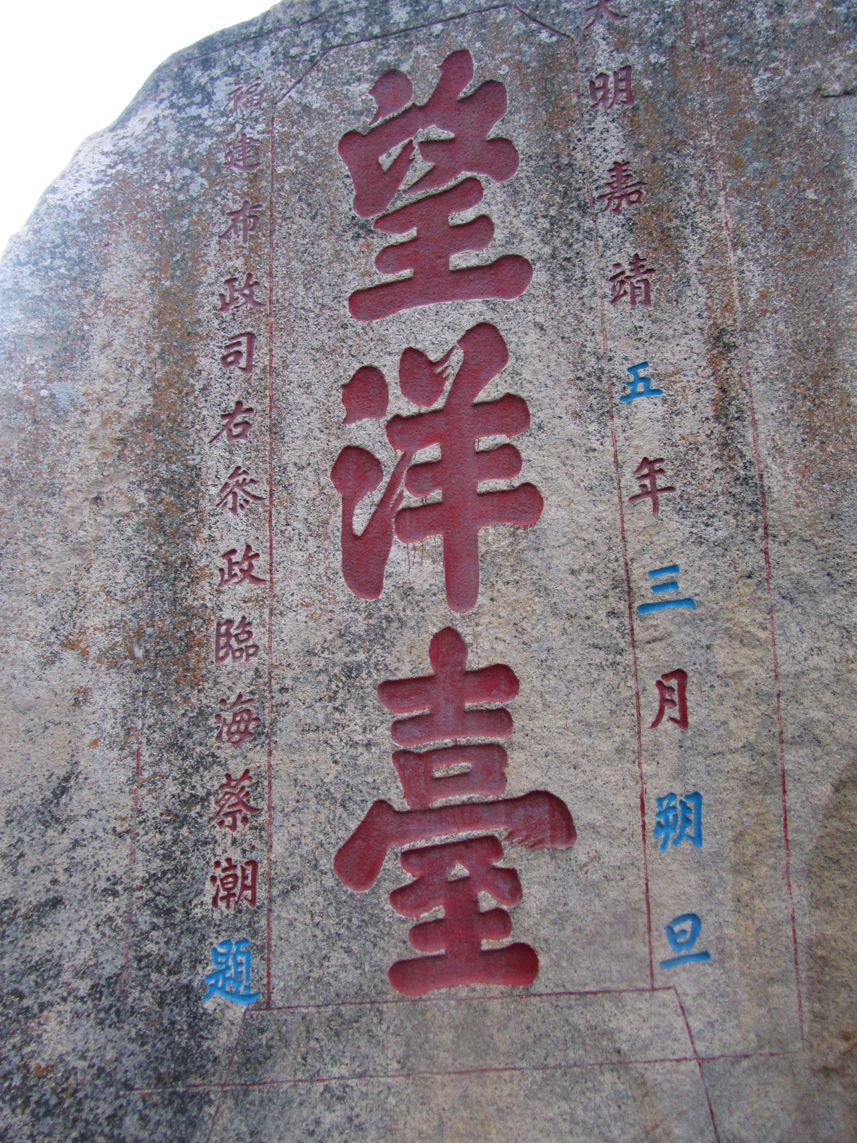 位于漳州市诏安县梅岭镇悬钟所城外的望洋台。